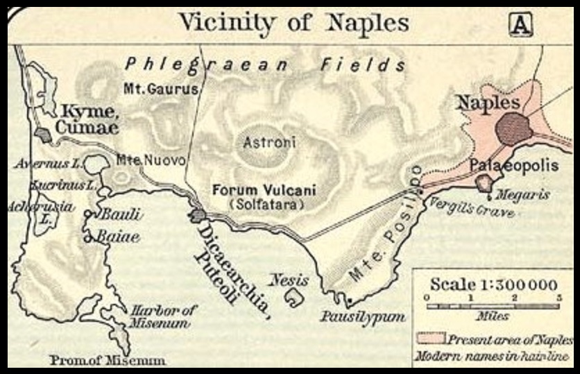 Mappa dello Shepherd (1911) sul golfo di Napoli e poi del litorale fino a Cumae